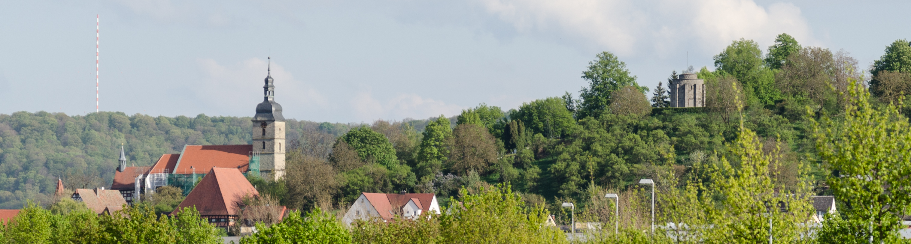 Burgbernheim, Ev. Kirche und Kriegerdenkmal, von Norden